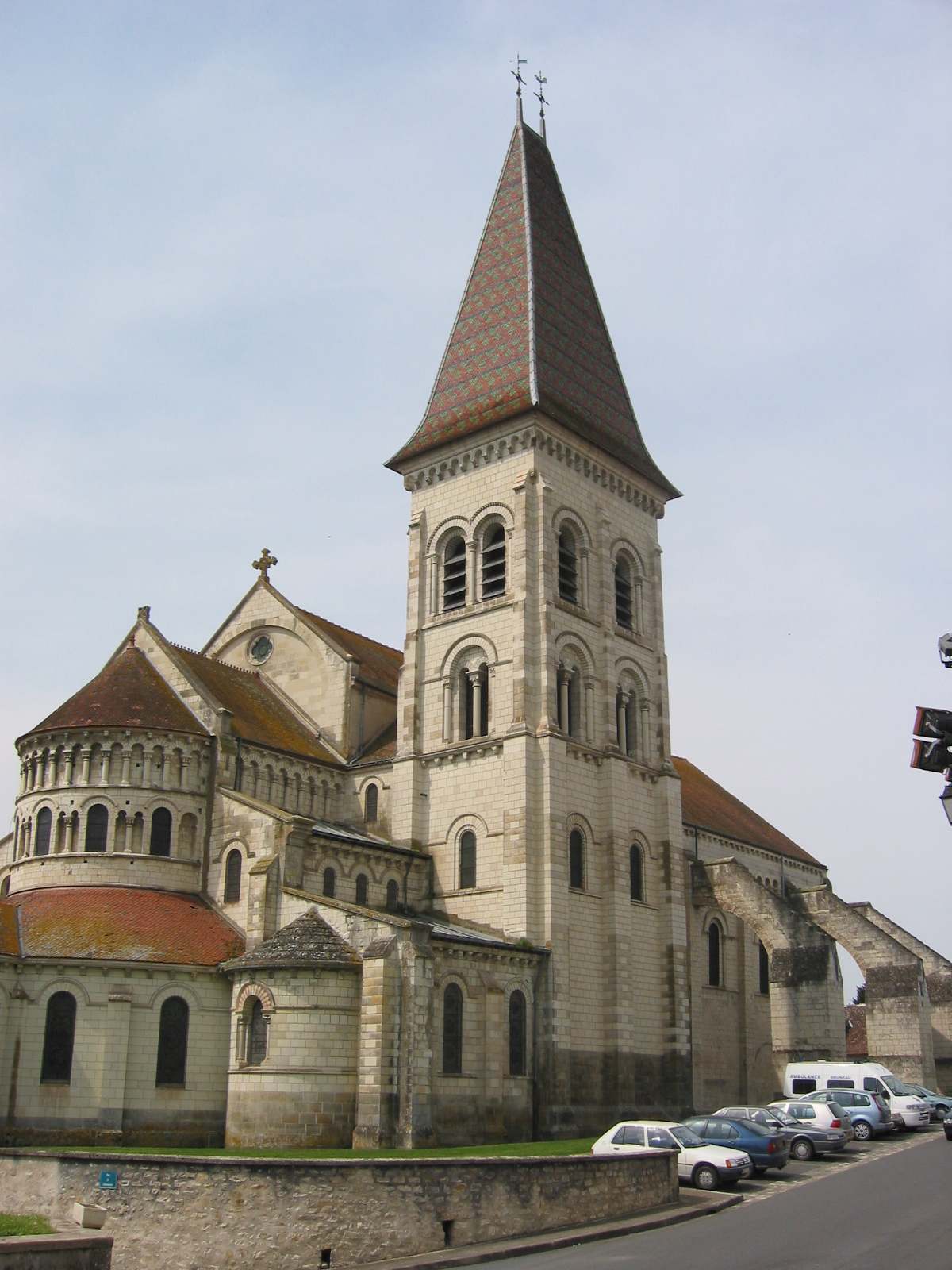 Abbatiale Saint-Pierre de Preuilly-sur-Claise, Indre-et-Loire, France